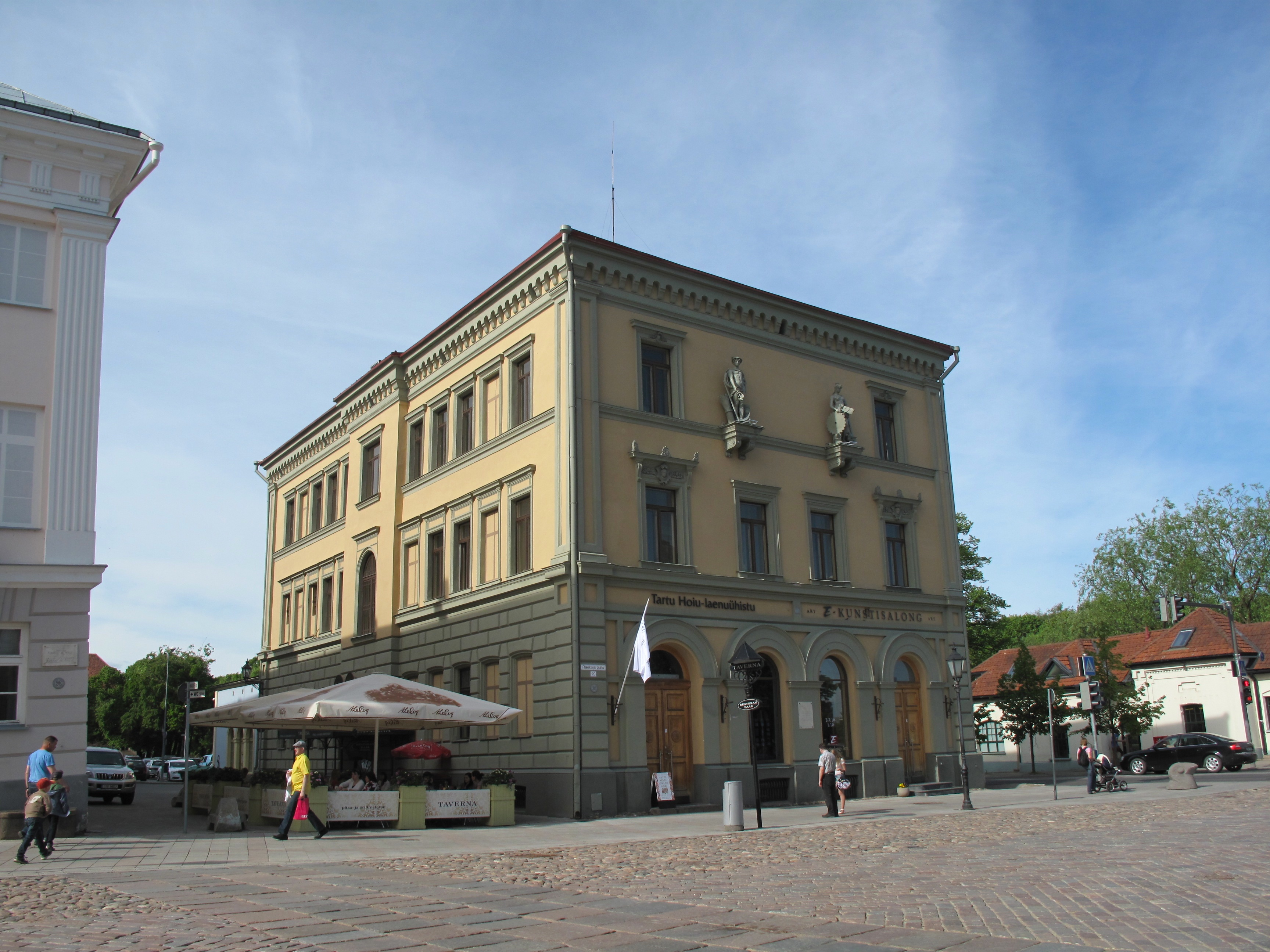 Pangahoone Tartus aadressil Raekoja pl 20